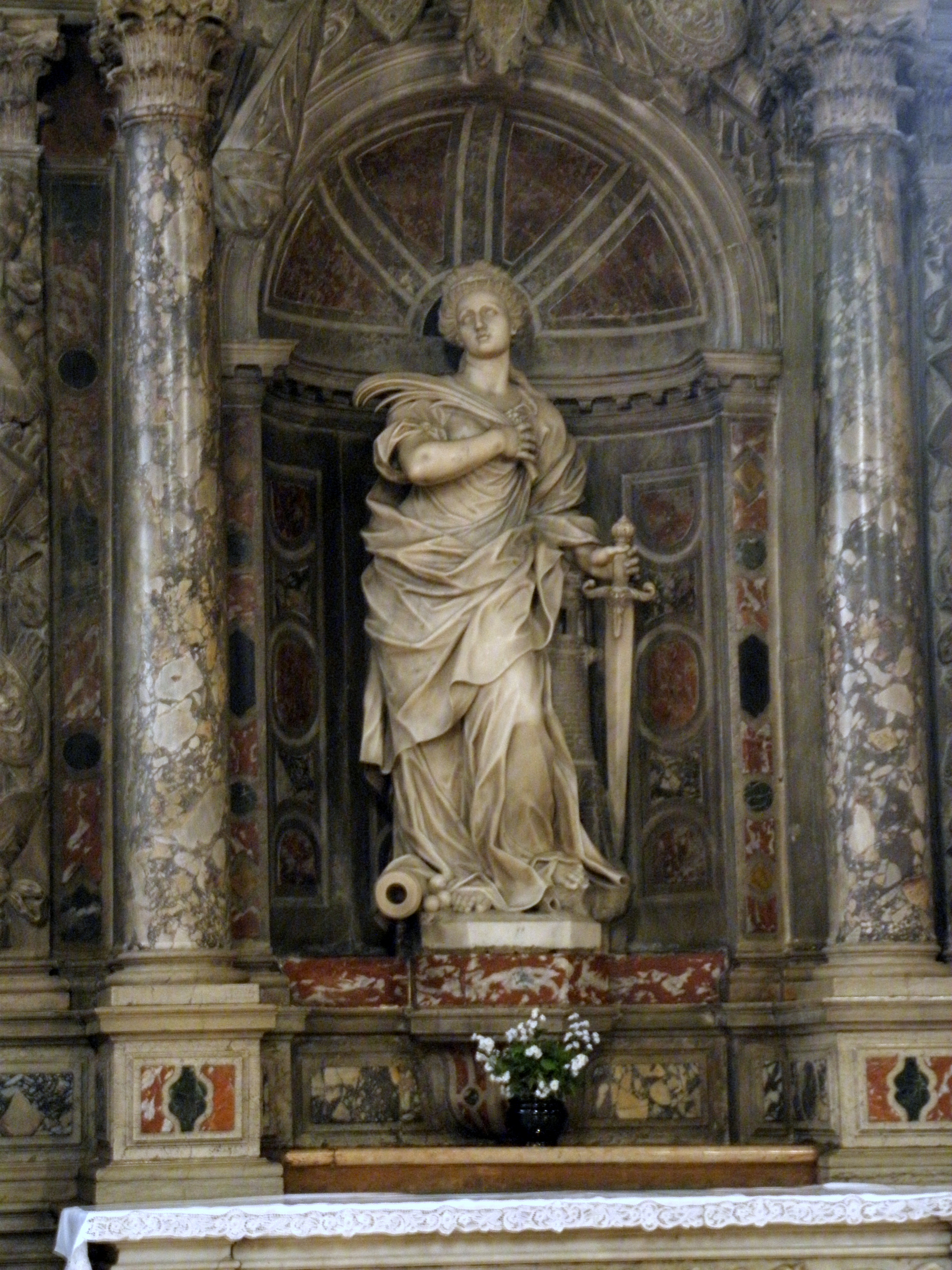 Rovigo, Chiesa di Sant'Antonio Abate detta San Domenico: dettaglio del primo altare sulla sinistra dedicato a Santa Barbara, la statua della santa.